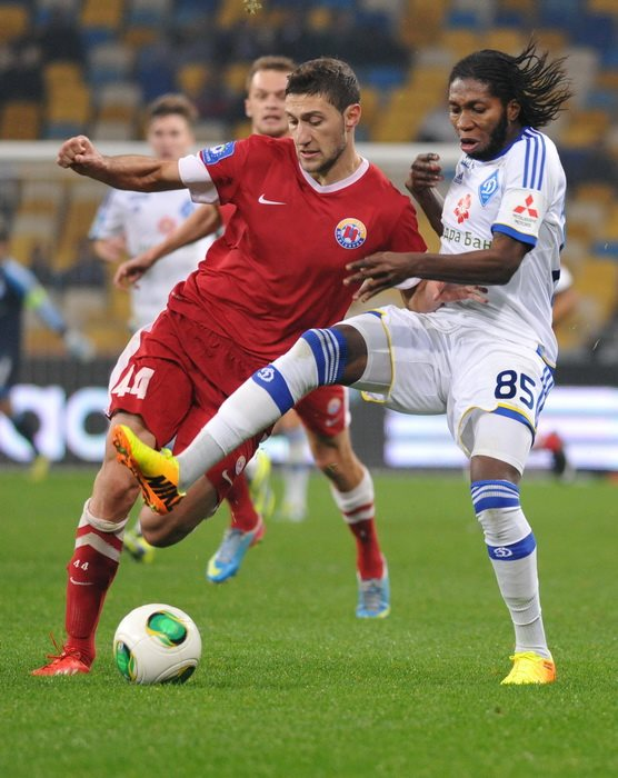 Иван Ордец